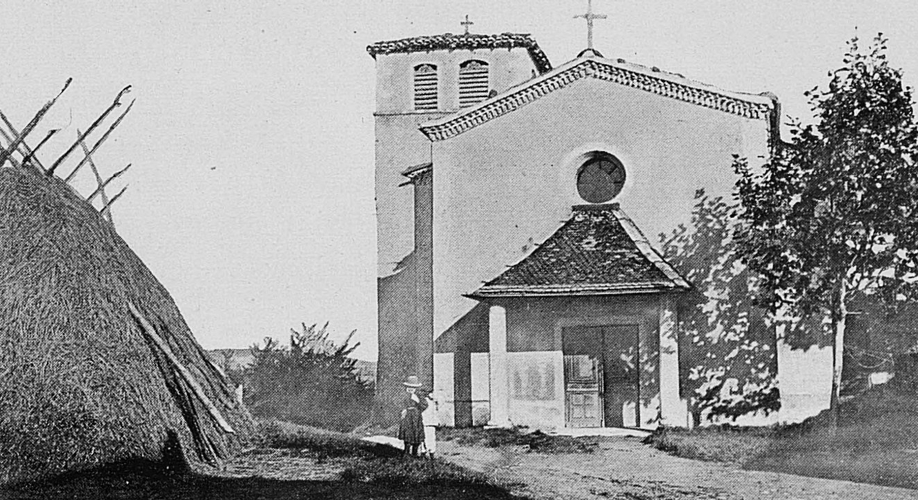 Dictionnaire illustré des communes du département du Rhône. Tome 1 / par MM. E. de Rolland et D. Clouzet.